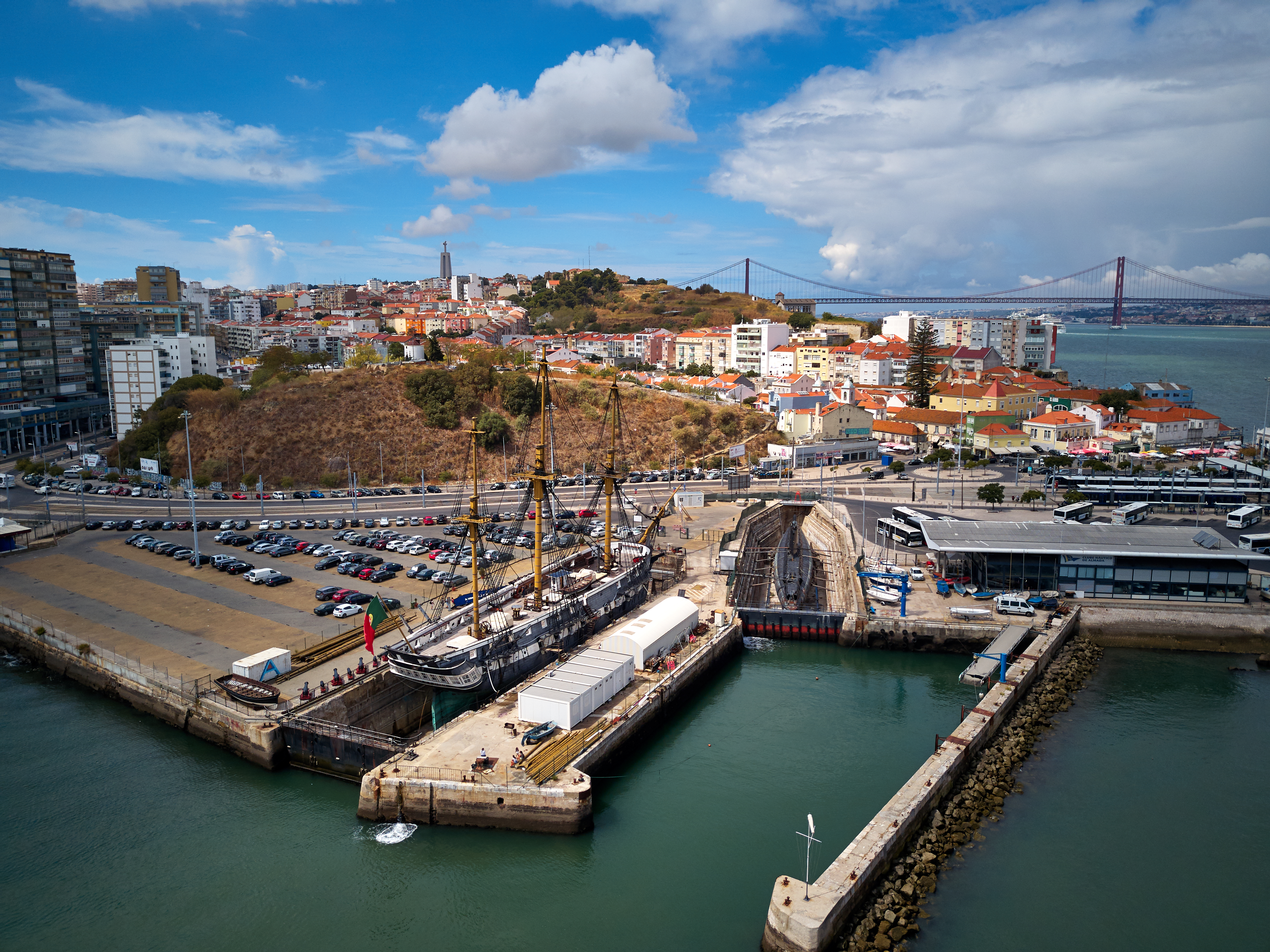 Almada